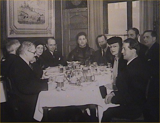 Fra det stiftende møde i Eventyrernes Klub på Universitetscaféen i 1938. Fra venstre: Dr. Aage Krarup Nielsen, Ingeniør Ib M. Nyeboe, Fru Magdalene Freuchen, Kaptajn A. P. Botved, Antoine Moller, Direktør Chr. Ditlev Reventlow, Fru Estrid Bannister (senere Estrid Good), Janus Sørensen, Peter Freuchen og Carl Mogensen.